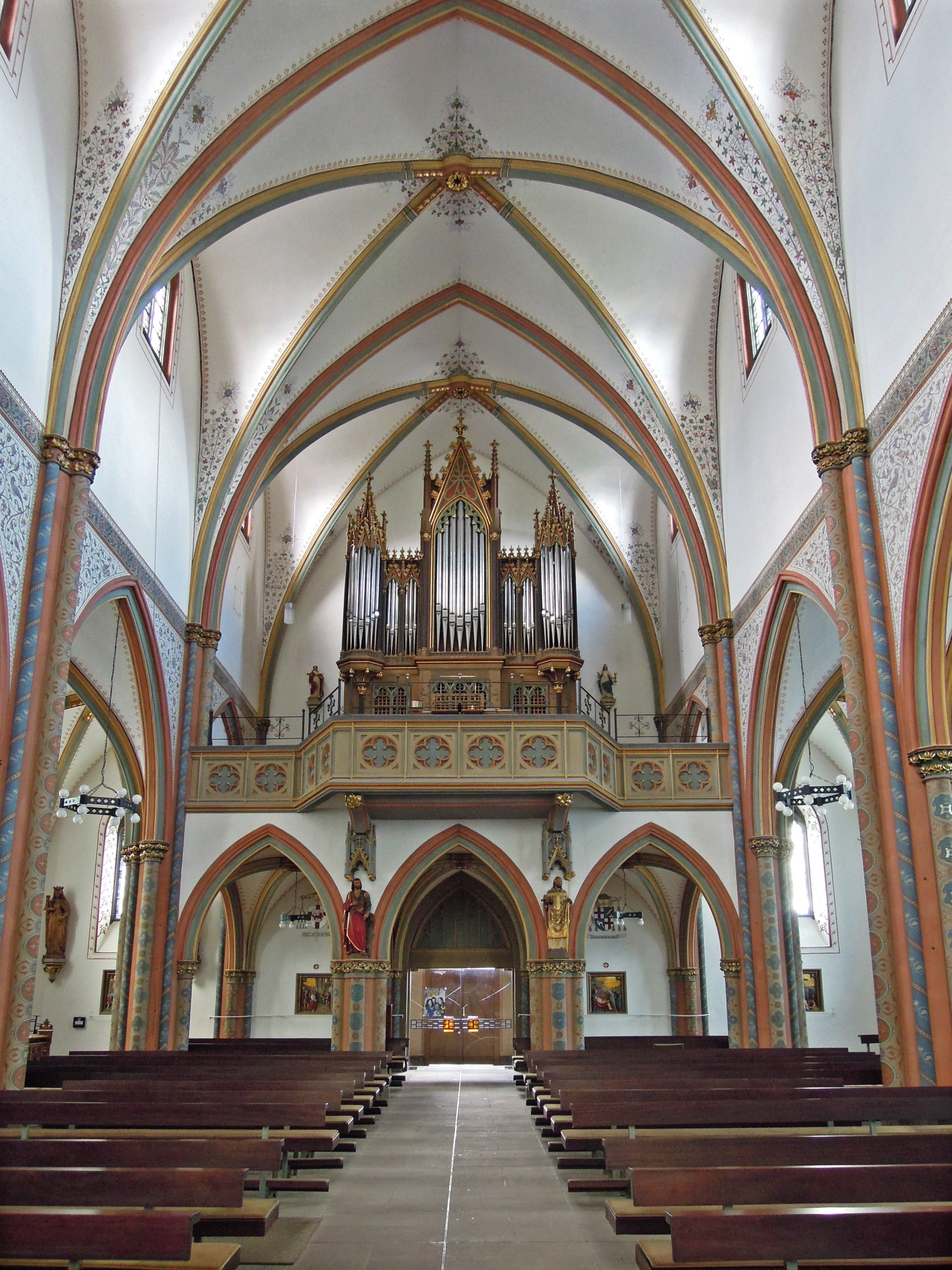 Kirche in Wallerfangen